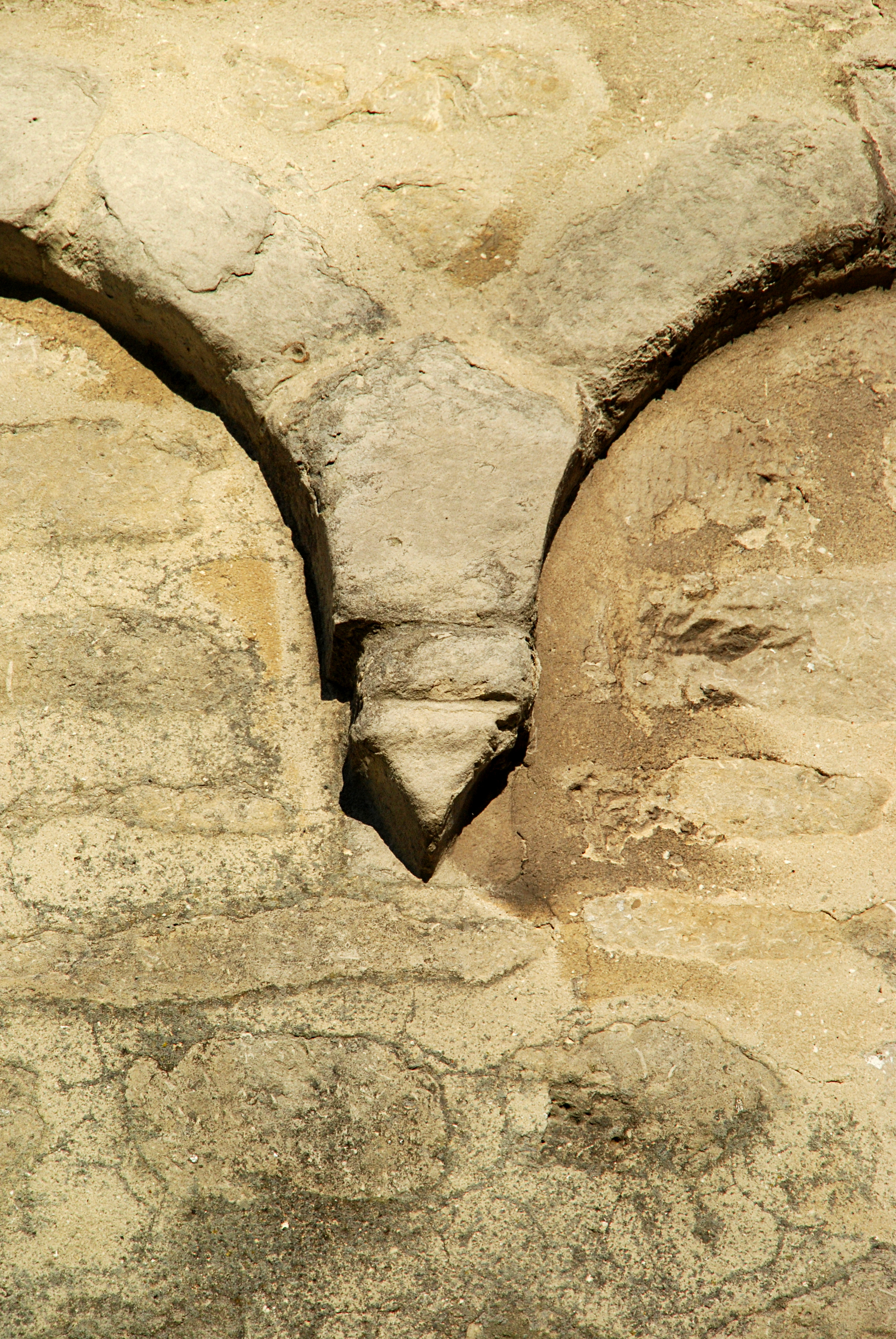 Belgique - Hainaut - Bons Villers - Frasnes-lez-Gosselies - Chapelle Notre-Dame du Roux